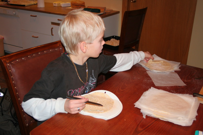 Skorið út í laufabrauð. Laufabrauð, um pão típico da Islândia. Laufabrauð, an icelandic sort of bread.